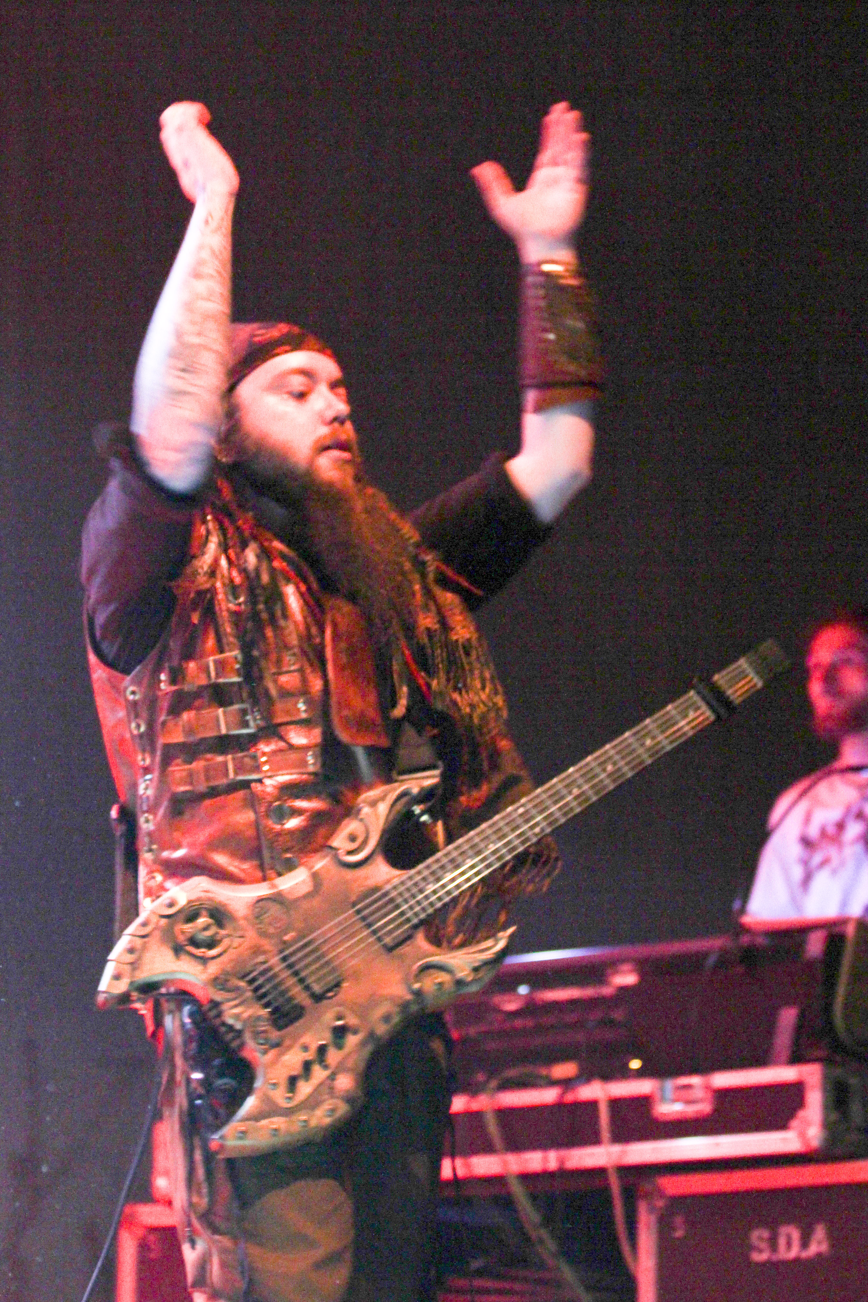 Abney Park auf dem Wave-Gotik-Treffen 2013 in Leipzig, Agra-Halle.